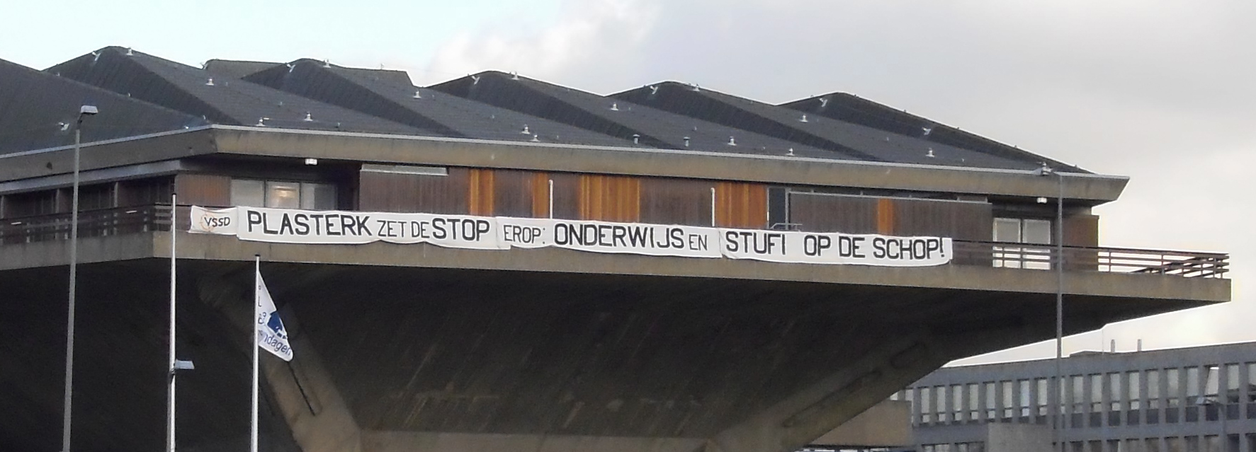 Afschaffing van de basisbeurs in het Nederlands onderwijs leidt tot protesten aan het begin van 2010.